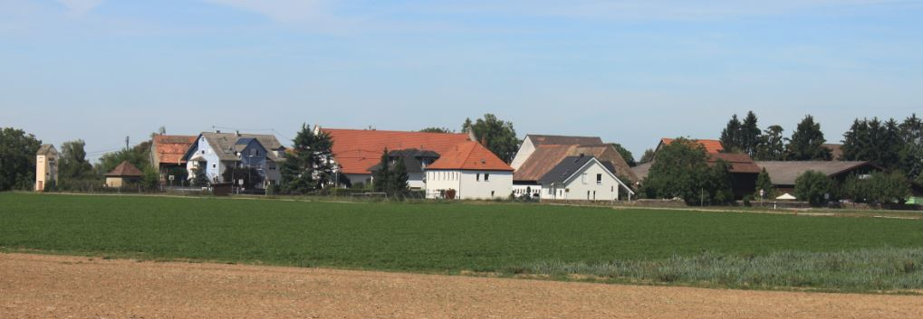 Blick von Südosten auf Bruchhausen, September 2018